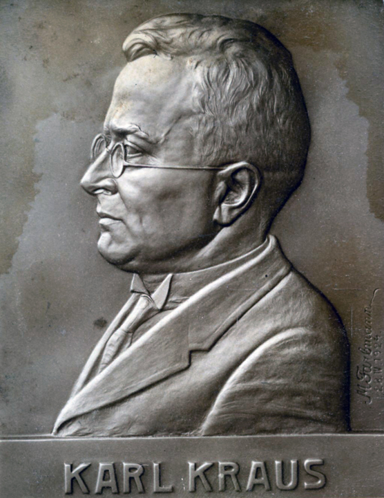 Relief